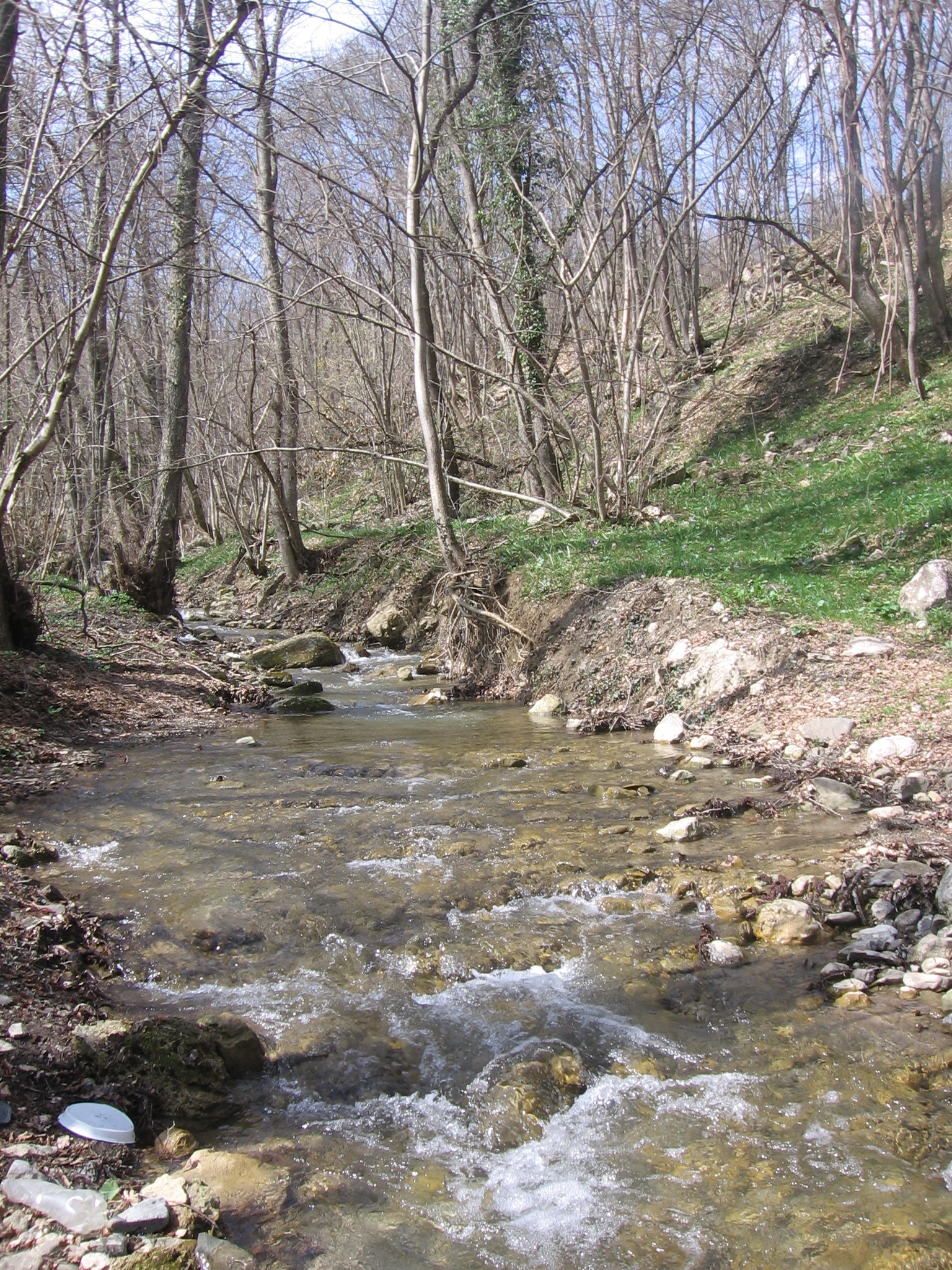 Русло Улу-Узень Алуштинского после впадения Узень-Баша до водохранилища, Крым